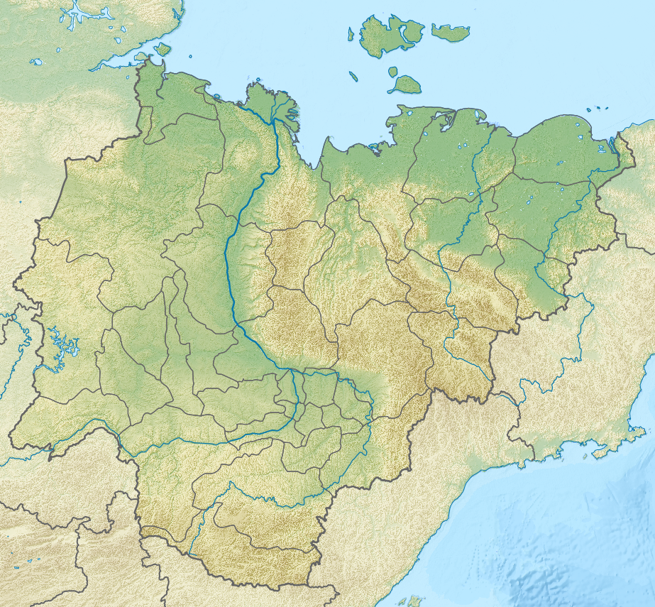 Физическая карта Якутии, Россия.